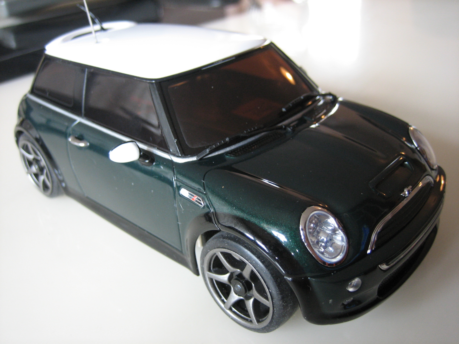 Mini-Z awd